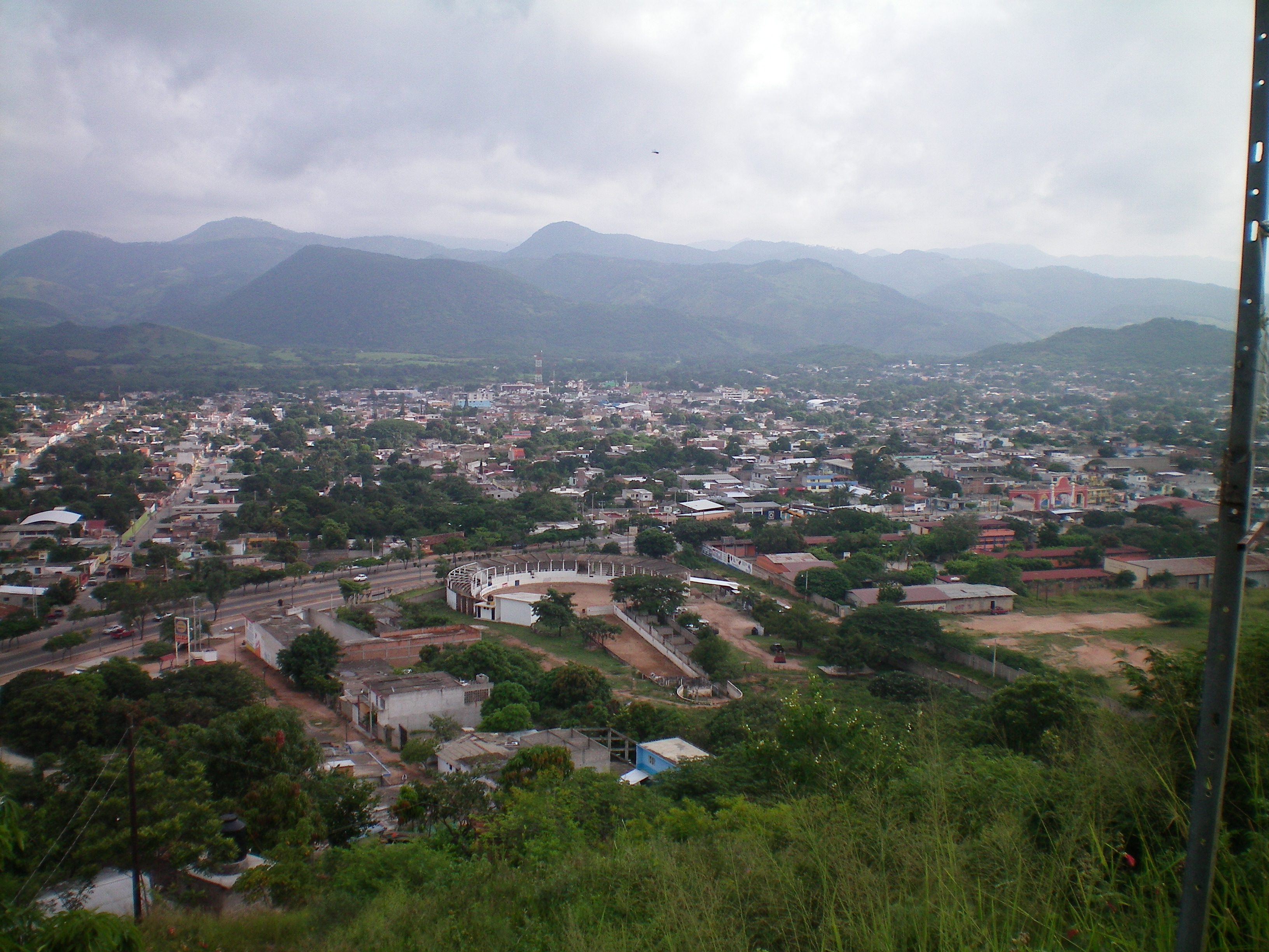 Cintalapa, Chiapas 2008